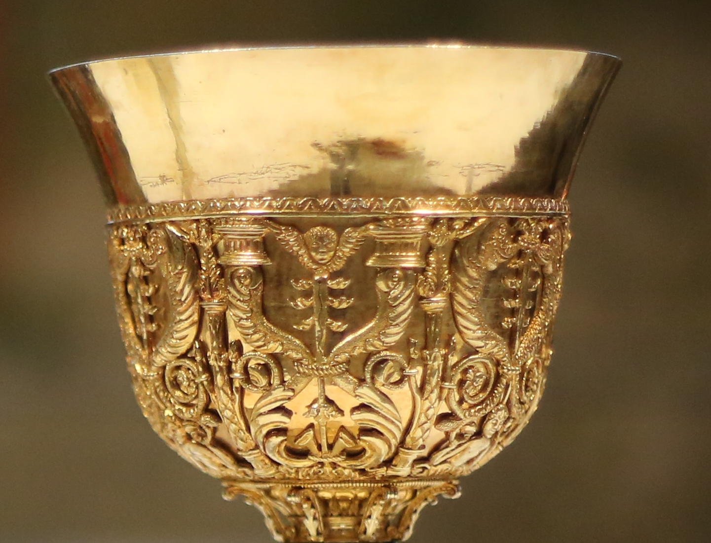 Détail de la coupe du grand calice de Saint-Jean-du-Doigt, montée. La photo est coupée à la limite inférieure de la fausse coupe.